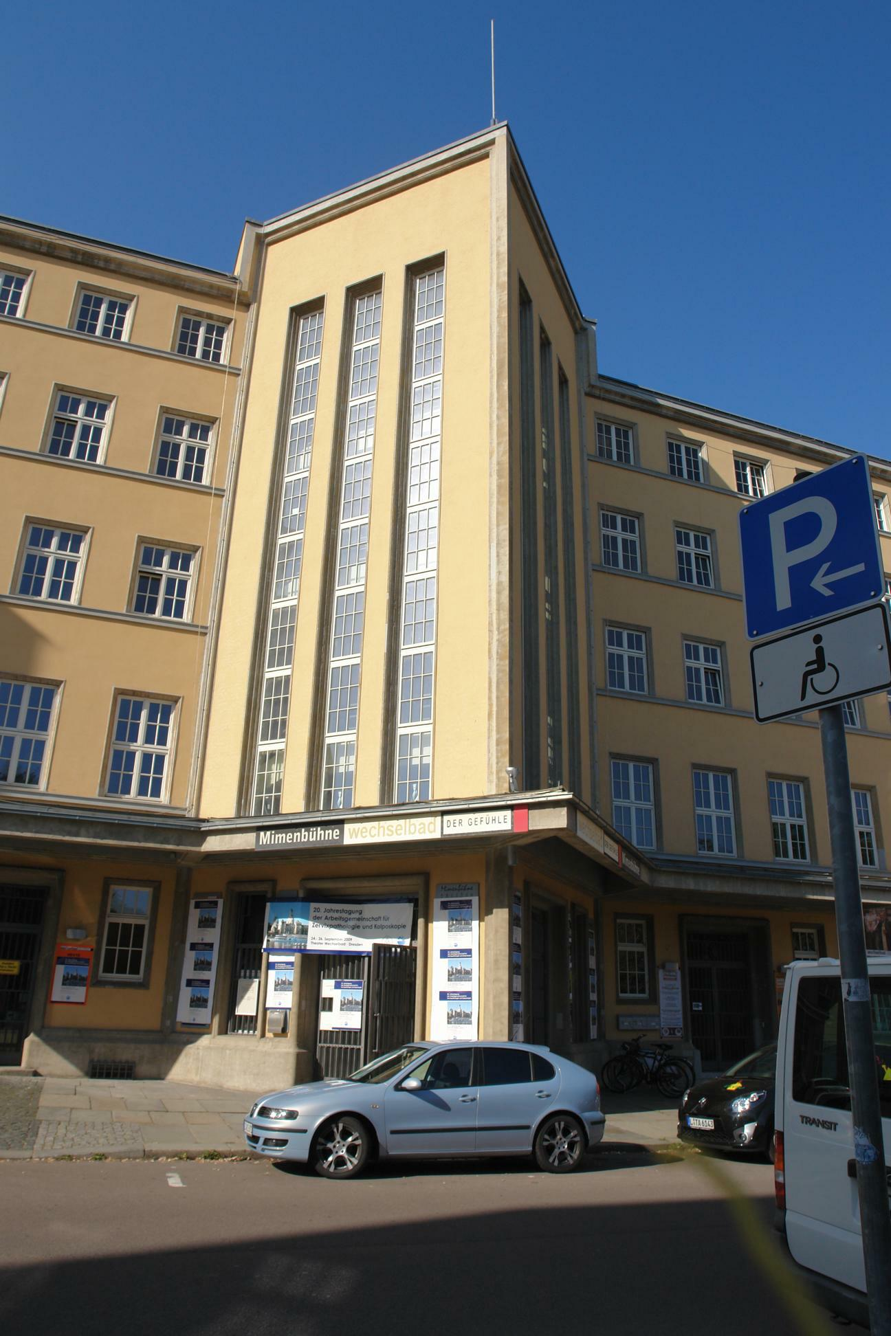 Theater „Wechselbad“. Ehemaliges Arbeitsamt von K. P. Andrae.